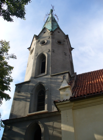 Wieża kościoła św. Marcina w Biskupicach